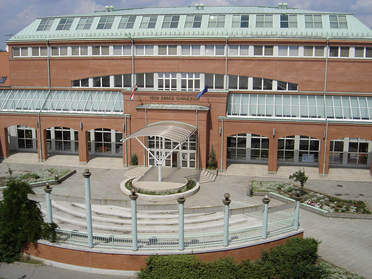 A Tóth Árpád Gimnázium főbejárata. - Debrecen, Szombathi István u. 12